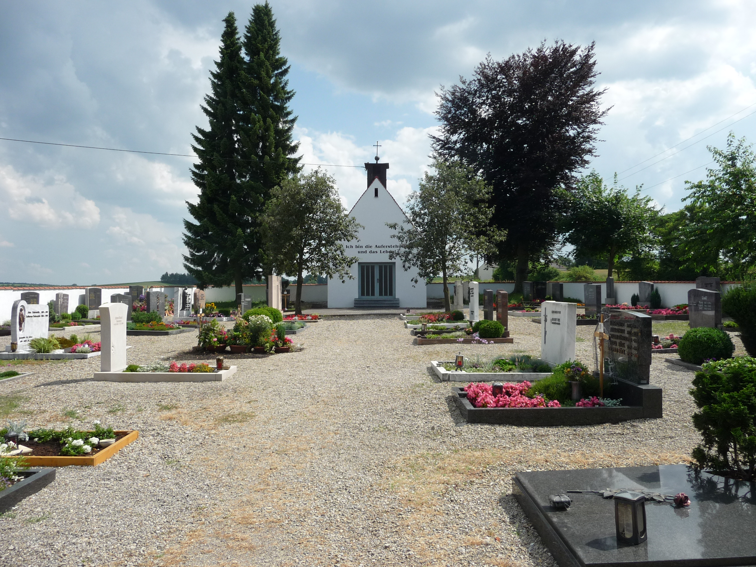 Der Friedhof mit Leichenhalle von Illdorf, Landkreis Neuburg-Schrobenhausen, Bayern.